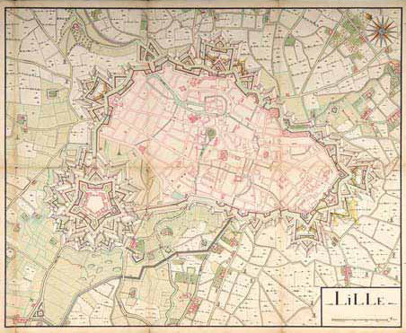 Plan de la ville de Lille avec les fortifications et la citadelle